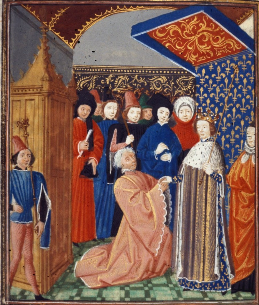 Gaston Fébus rencontre Charles VI à Toulouse.